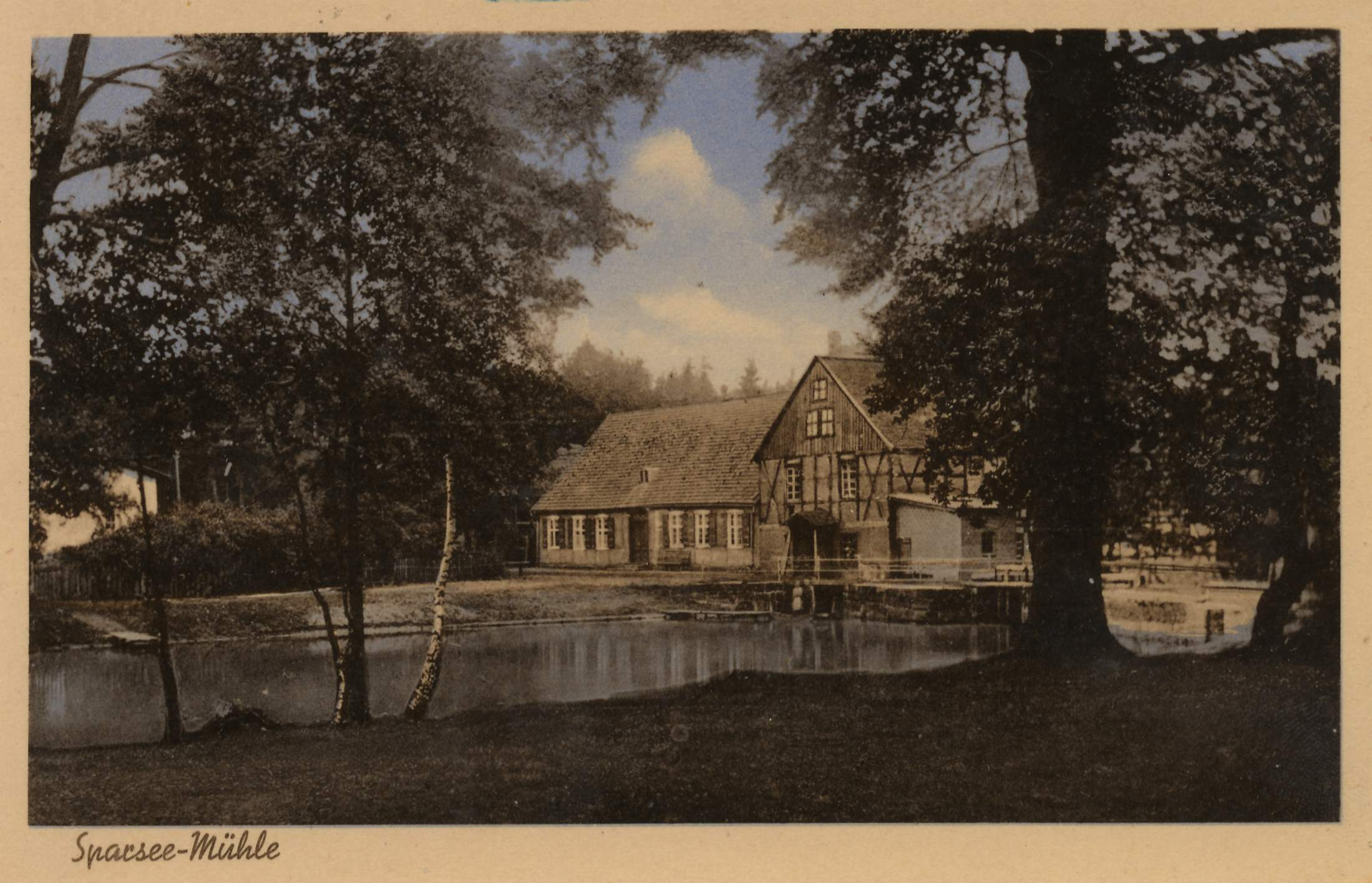 Mühle